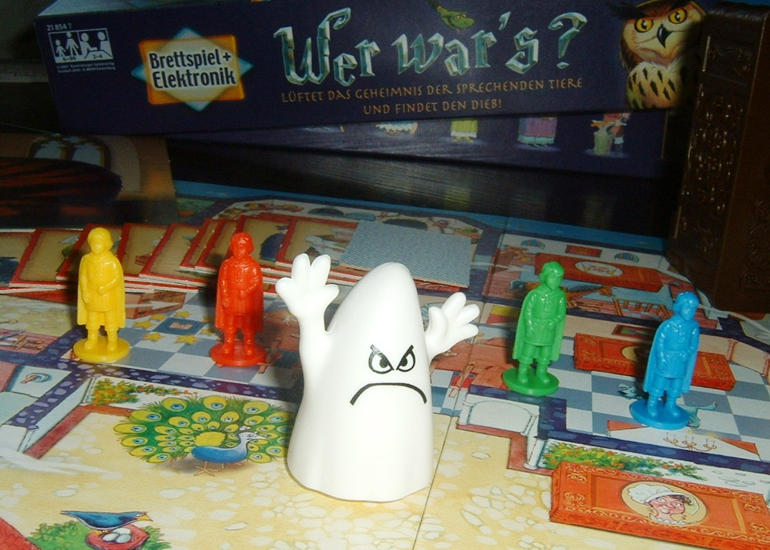 Figuren des Kinderspiel des Jahres Wer war's